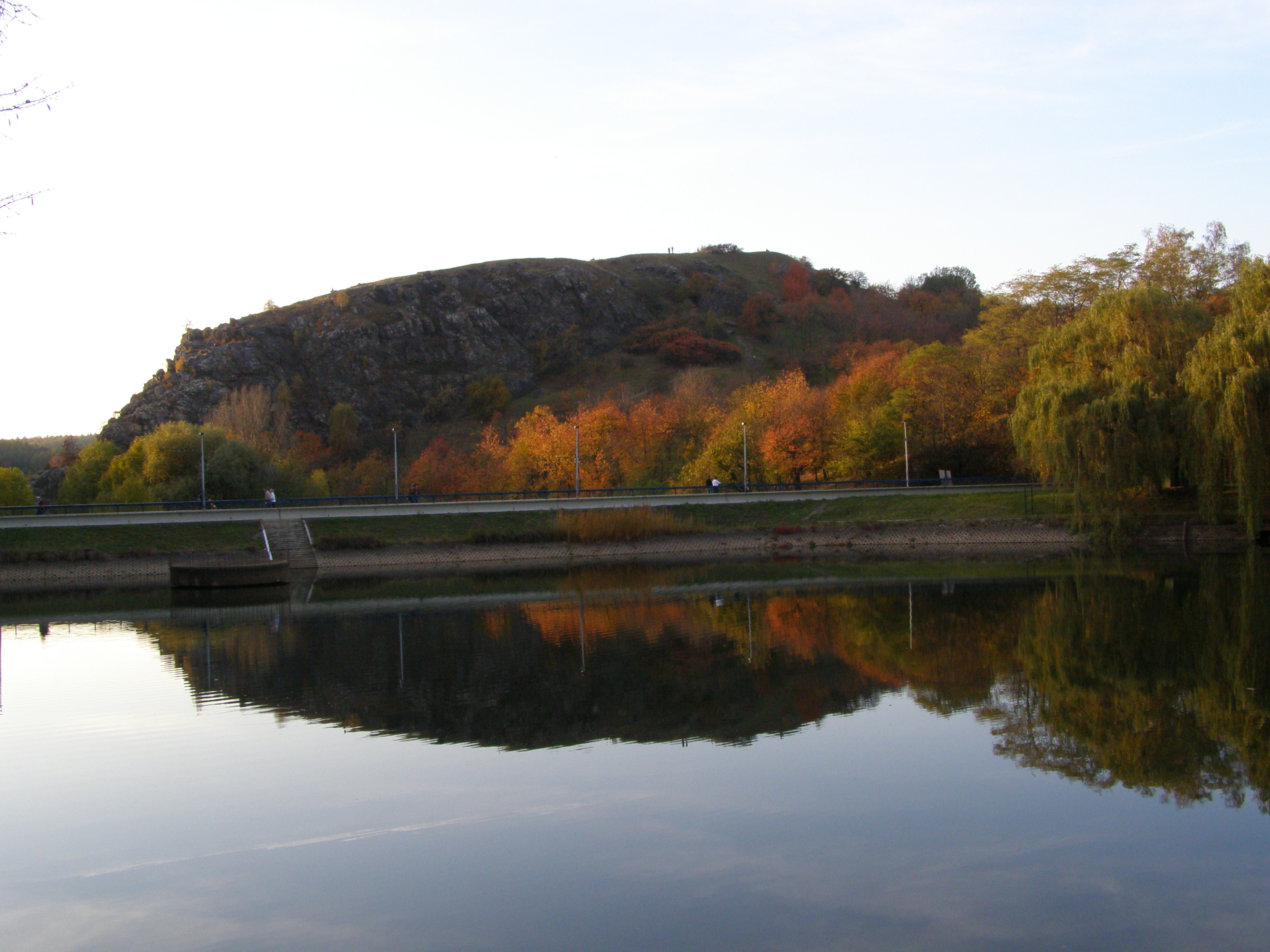 Praha, Vodní nádrž Džbán